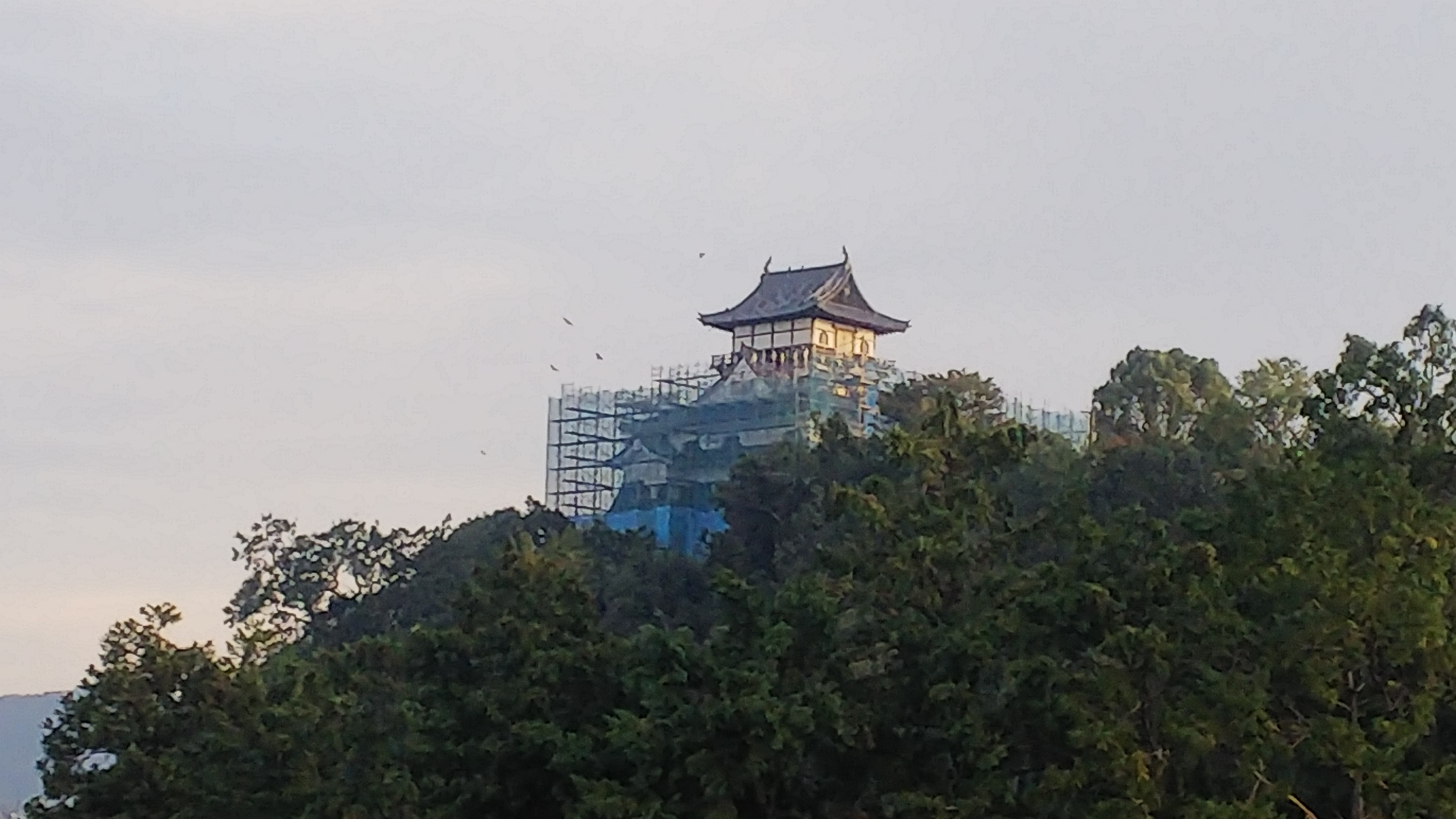 耐震工事中の犬山城2019年11月3日